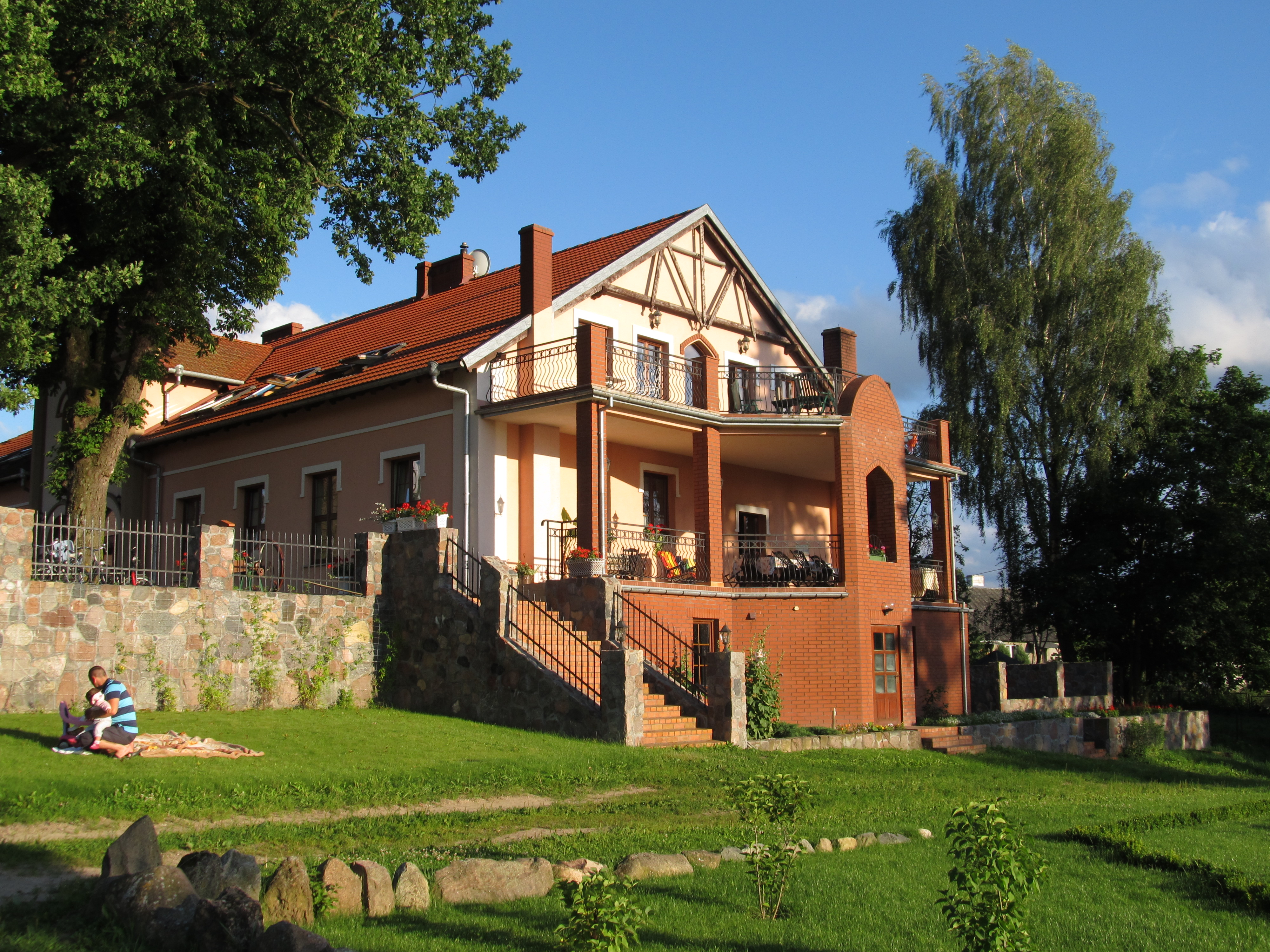 park dworski z przyległym terenem zabudowy mieszkalnej i gospodarczej Brożówka, Kruklanki